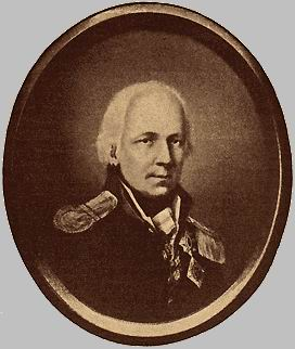 Граф Николай Семёнович Мордвинов (1754-1845)